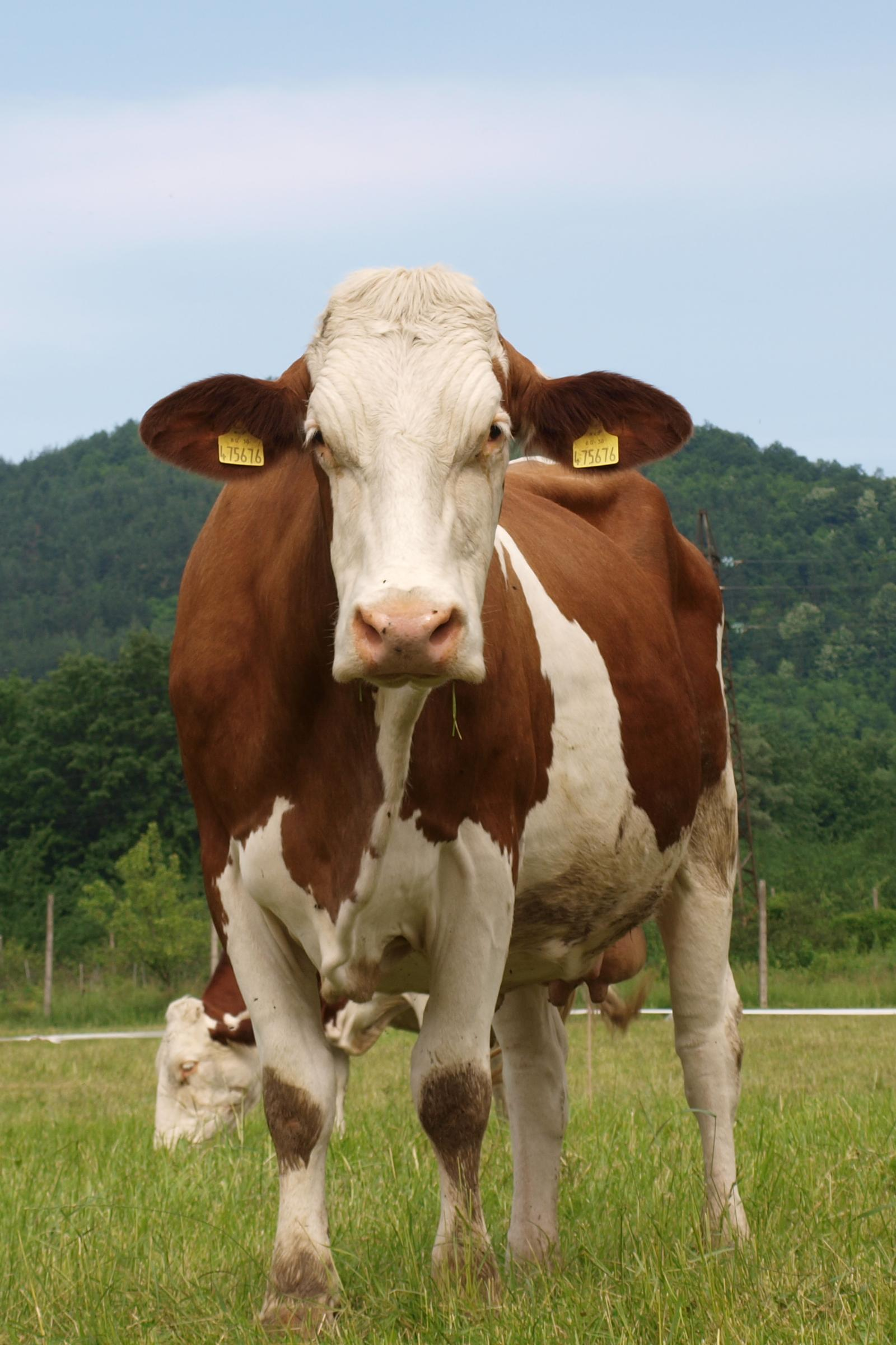 Крави в ИПЗЖ - гр. Троян